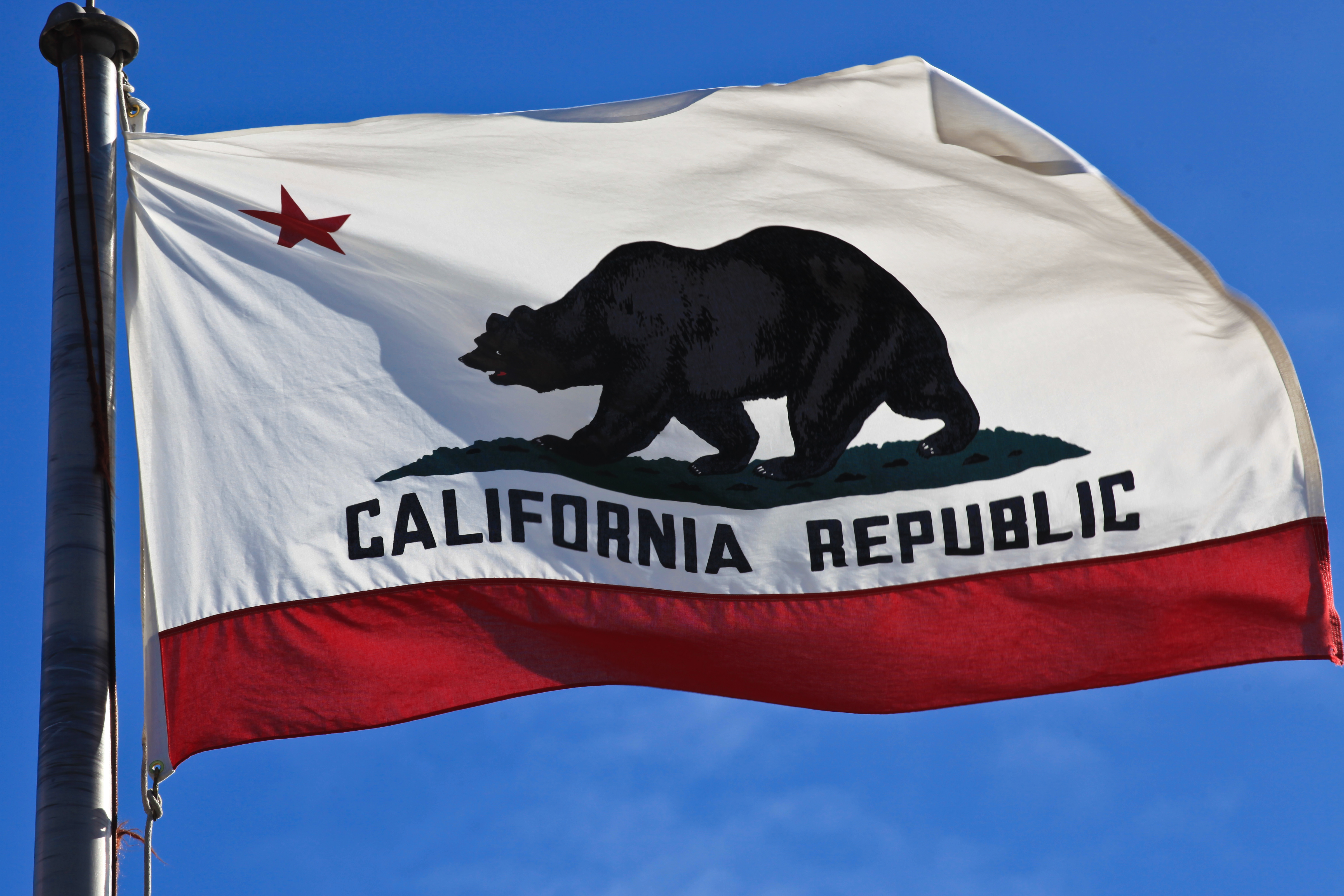 California Republic